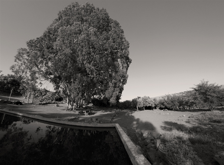 Источник рядом с мошавом Канаф